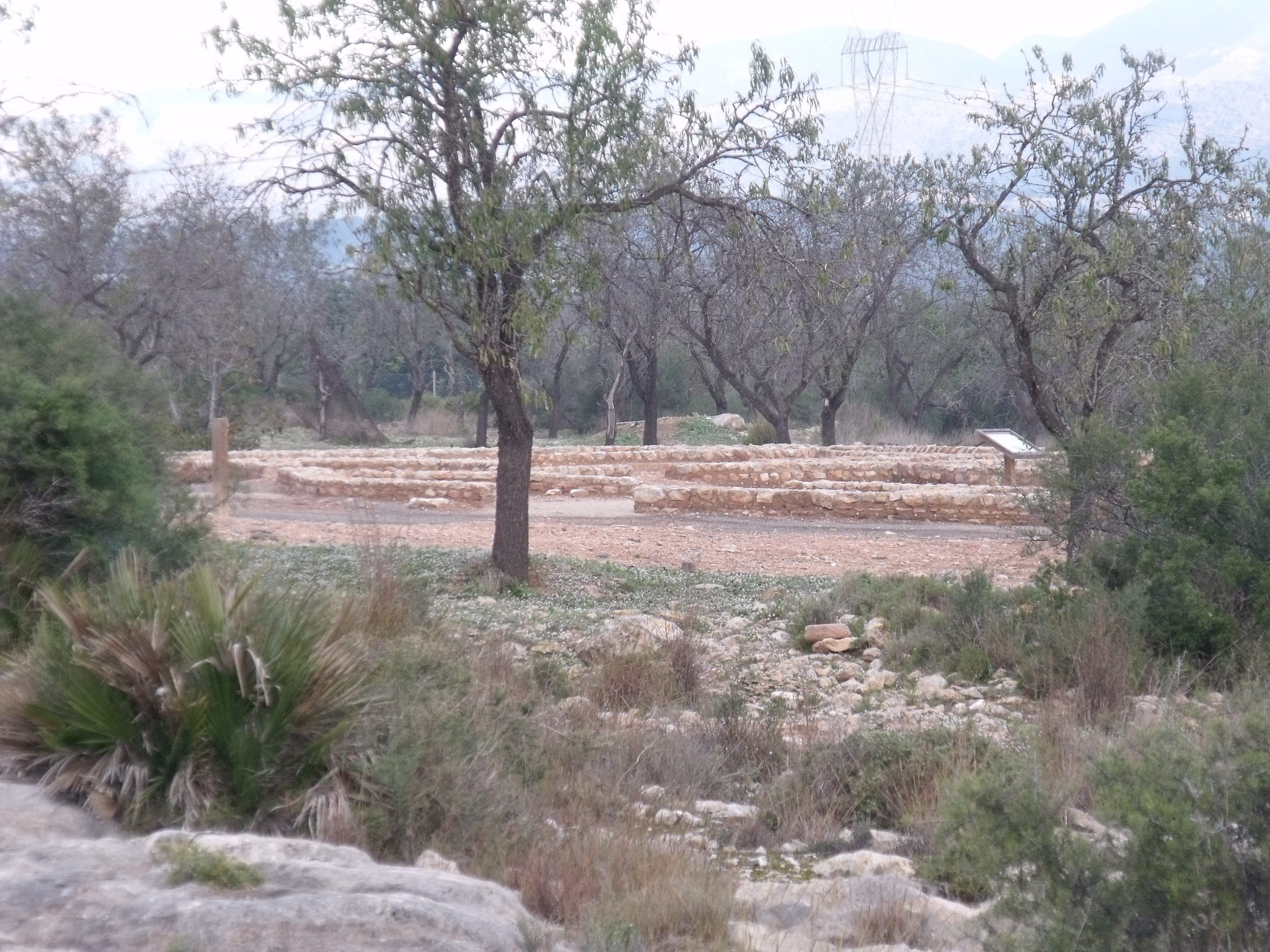 Restos de la alquería islámica de Bofilla, Bétera, España.